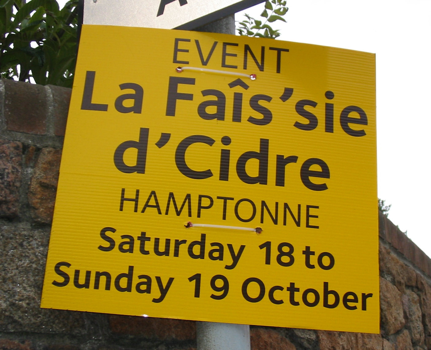 Nrf: Faîs'sie d'Cidre, 18 d'Octobre 2008, Jèrri